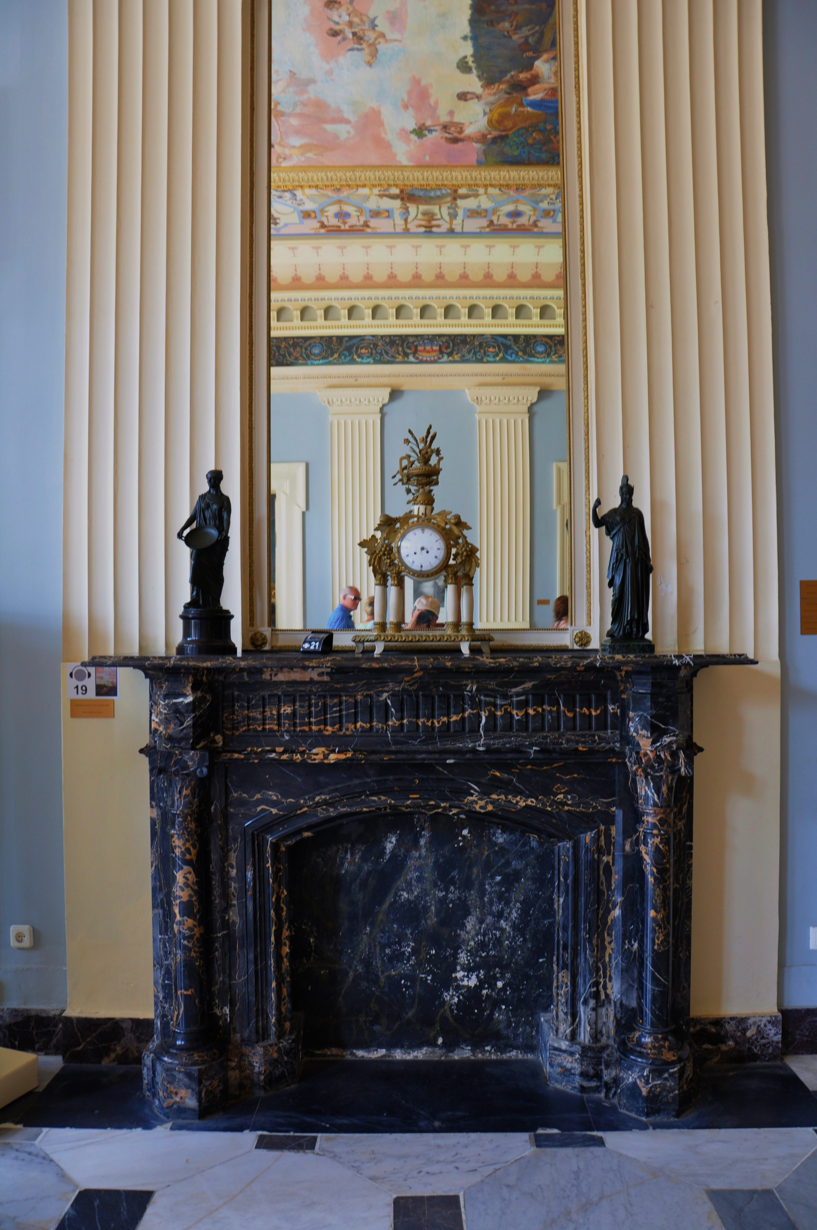 Αχίλλειο«Αχίλλειο»